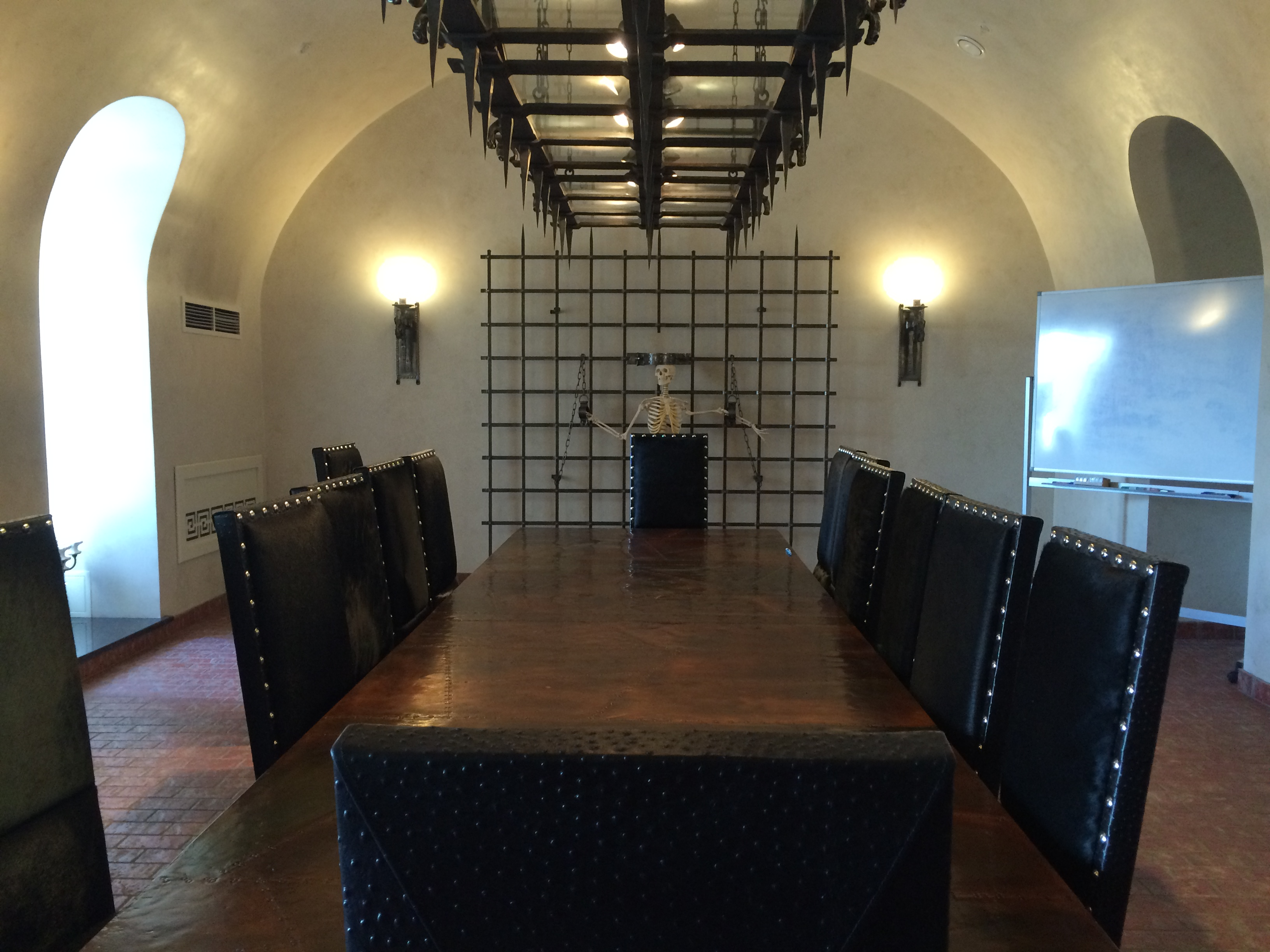 Дом компании 'Зингер': Невский проспект, 28, набережная канала Грибоедова, 21, Центральный район, Санкт-Петербург